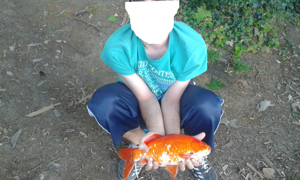 Carpa koi pescada con maíz.